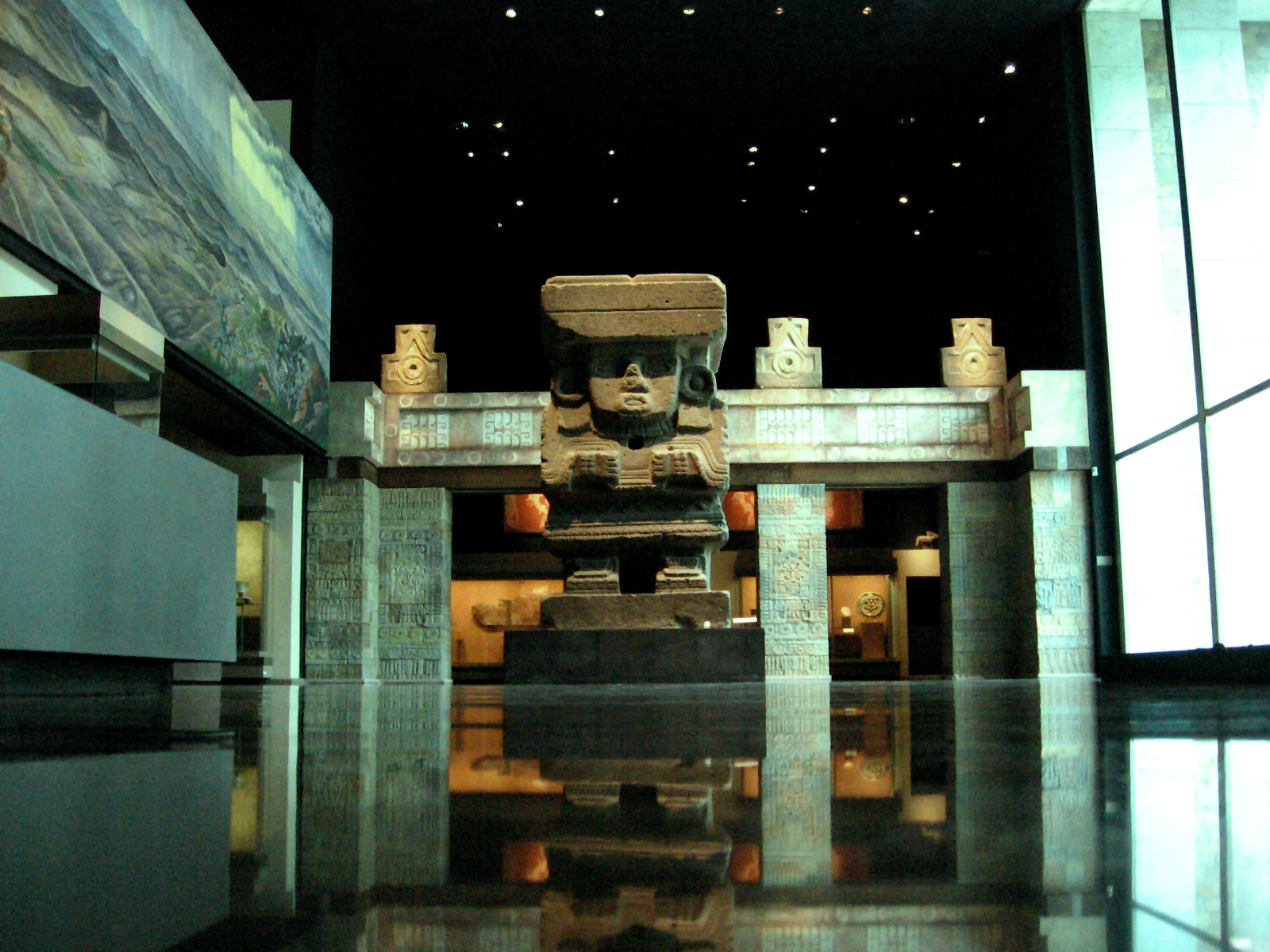 CHALCHITLICUE DIOSA DE LAS AGUAS